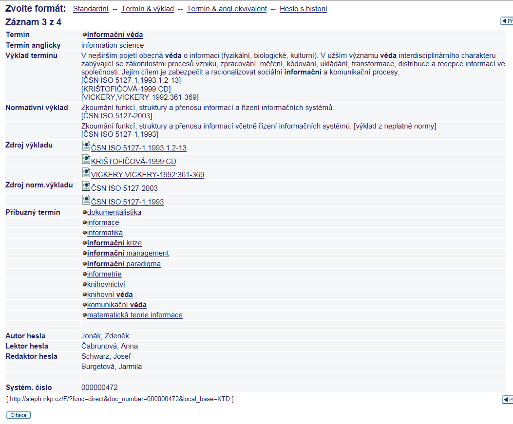 Snímek obrazovky zobrazení hesla v České terminologické databázi knihovnictví a informační vědy.